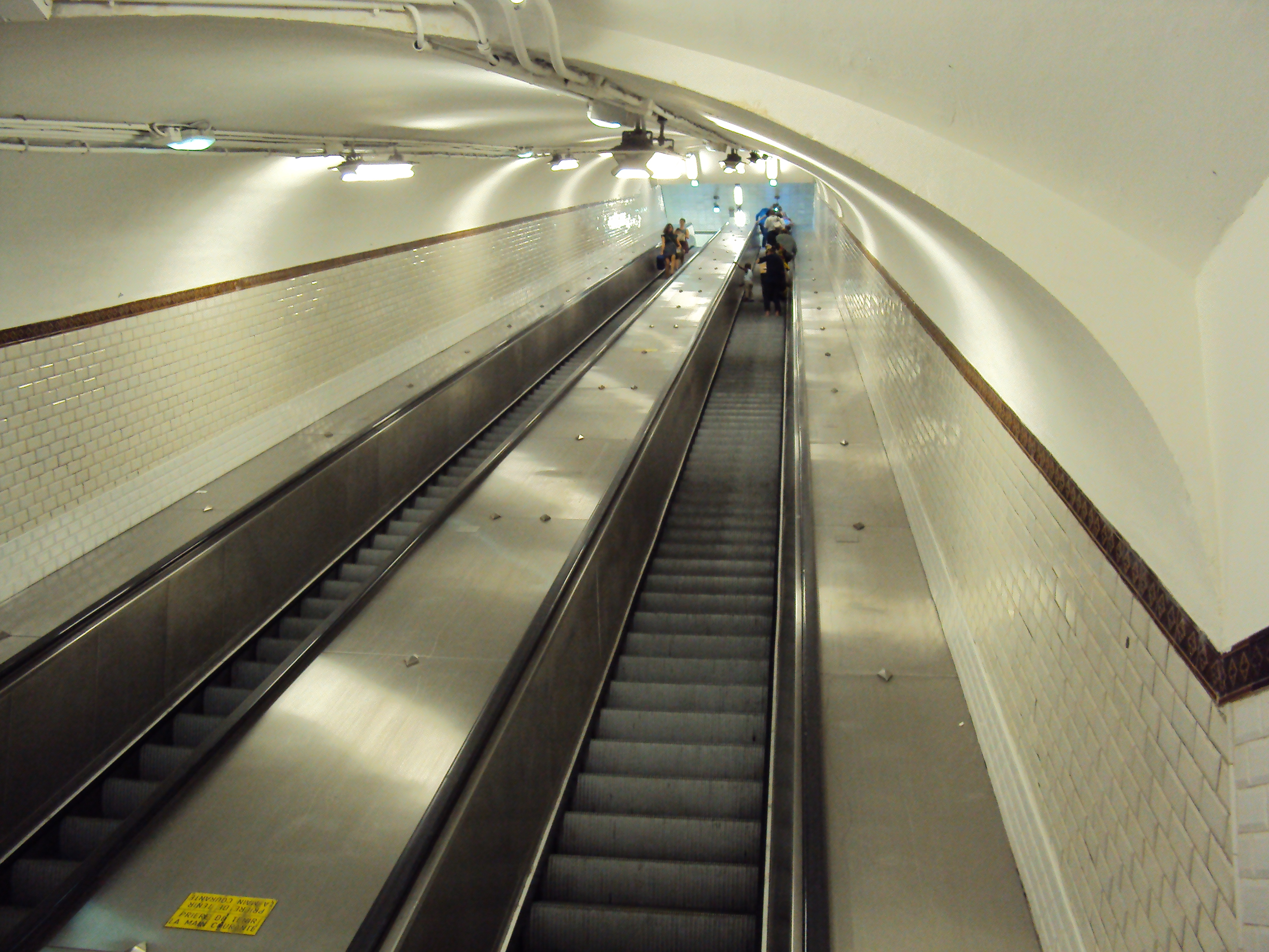 Metro place des Fetes - Escalators